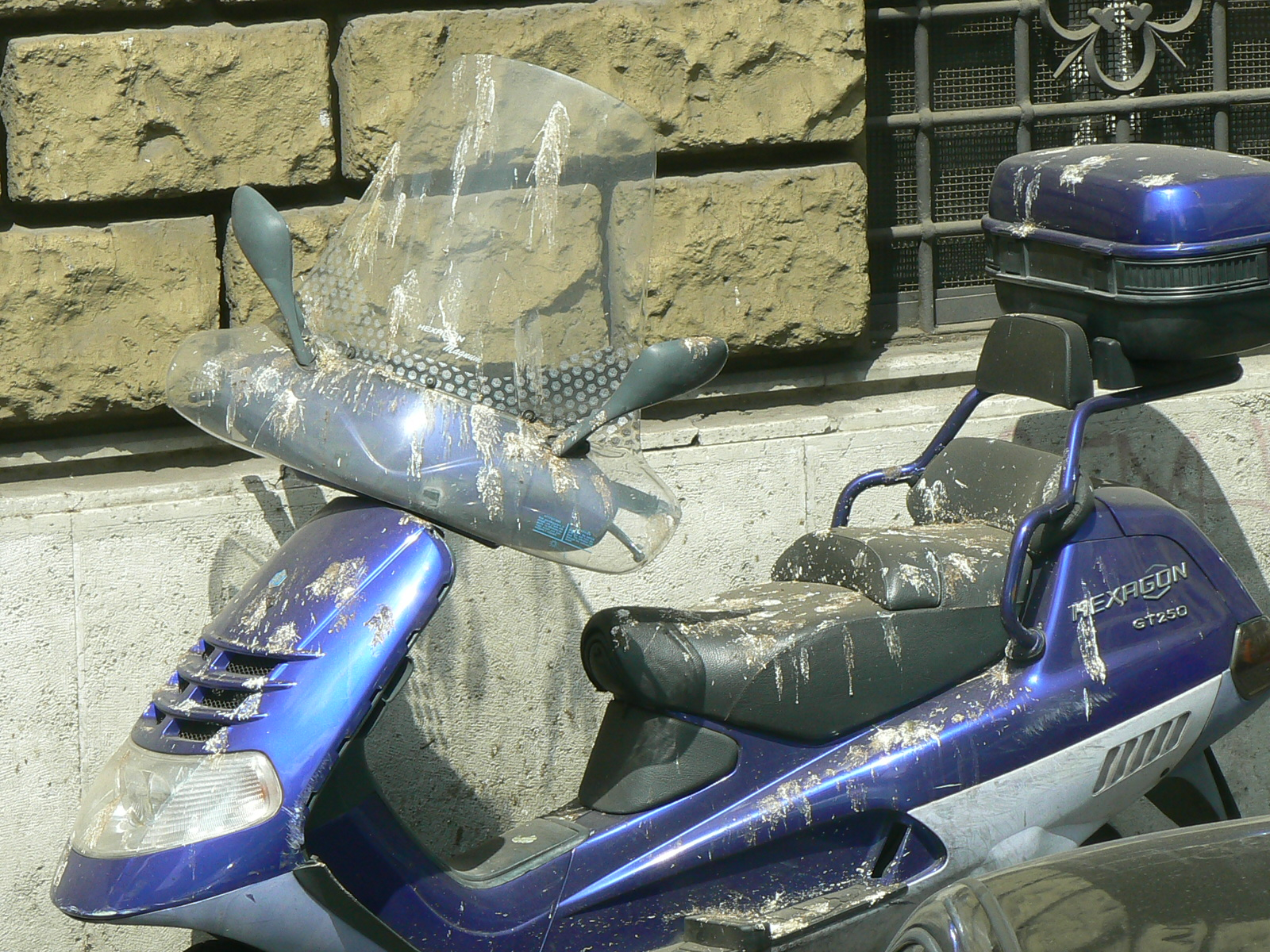 haha...this guy is gonna have a bad day Piaggio Hexagon 250GT